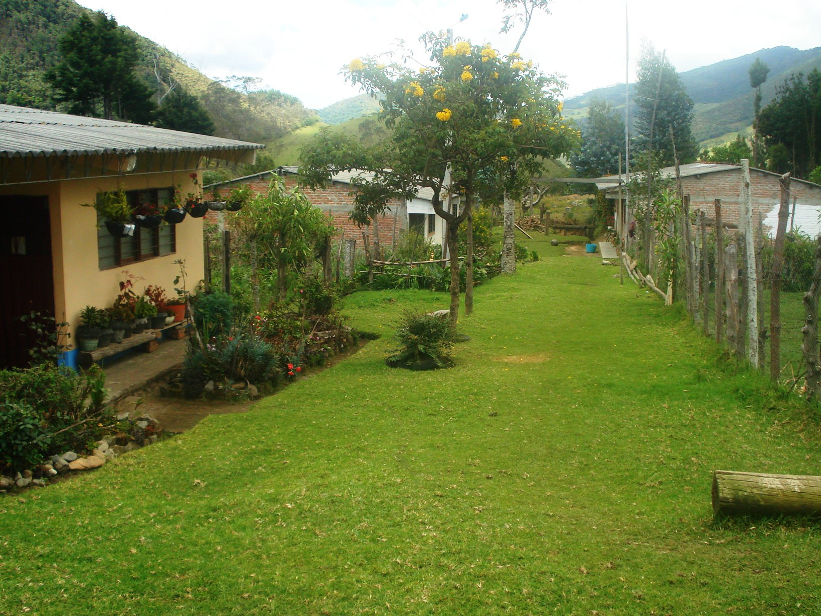 Una de las calles del Resguardo indígena de Pitayó